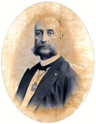 Retrato del médico valenciano Francisco de Paula Campá y Porta (1838-1892), fundador de la tocoginecología valenciana.